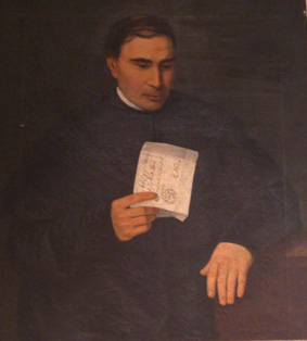 Anonimo, Ritratto dell'abate Giuseppe De Leva Gravina (XIX secolo). Modica, Museo Civico. Foto personale. Licenza libera.